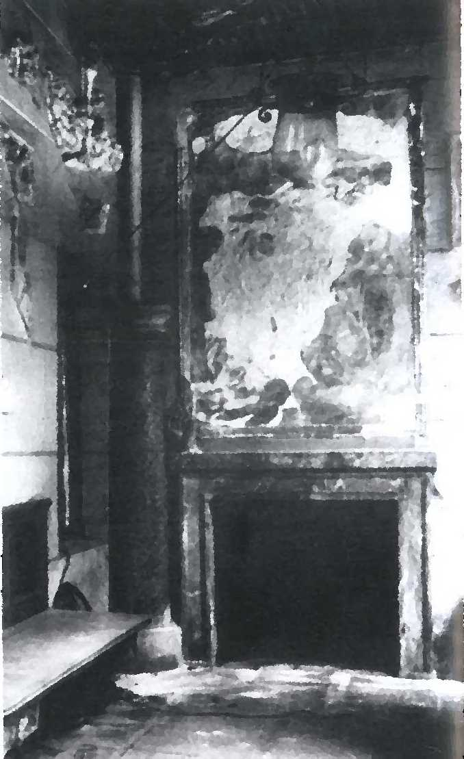 Klein-Glienicke, Verandakamin 1945 verfremdet